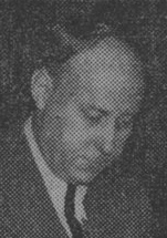 Arkitekten Tor Engloo